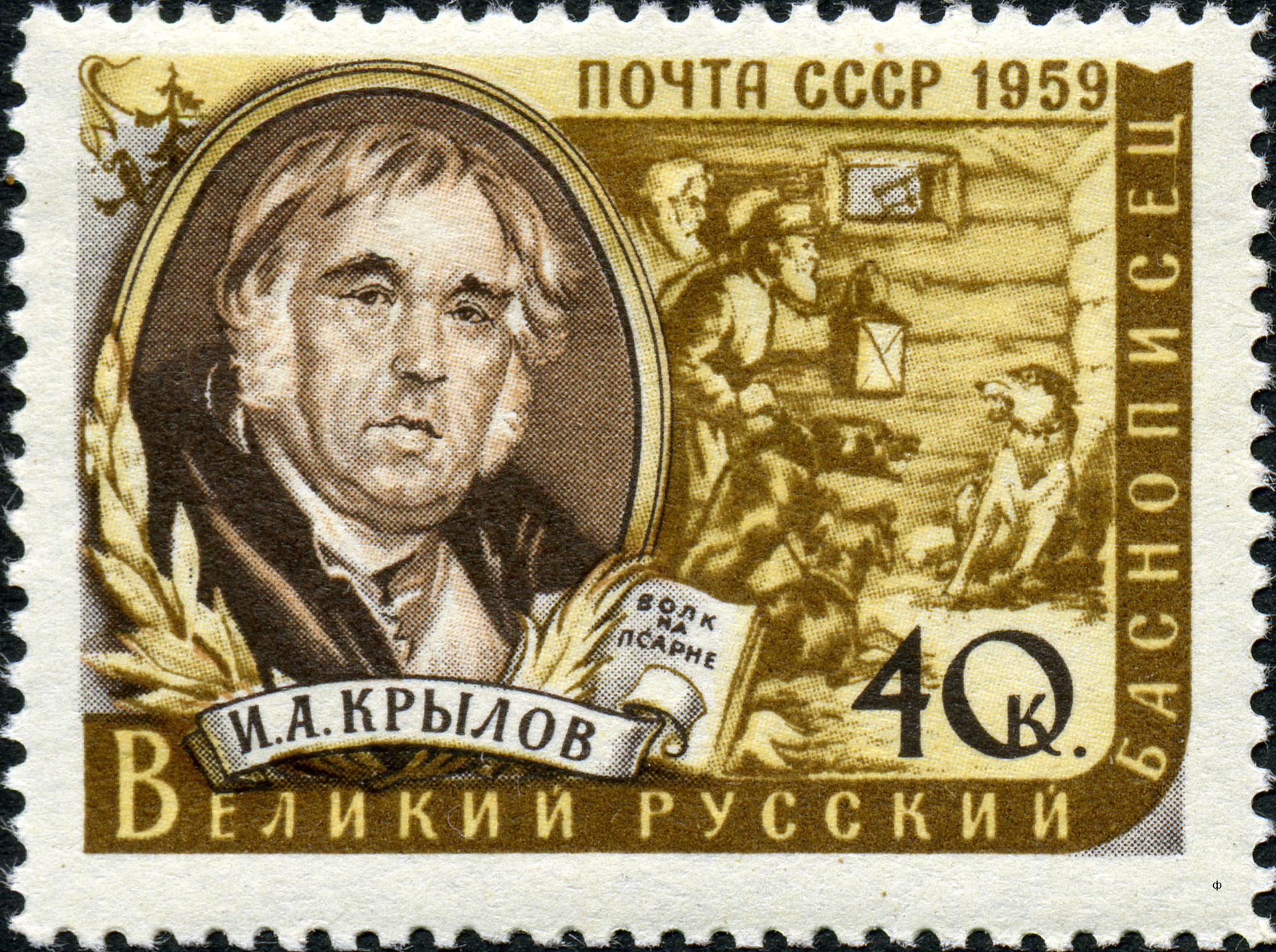 Марка СССР